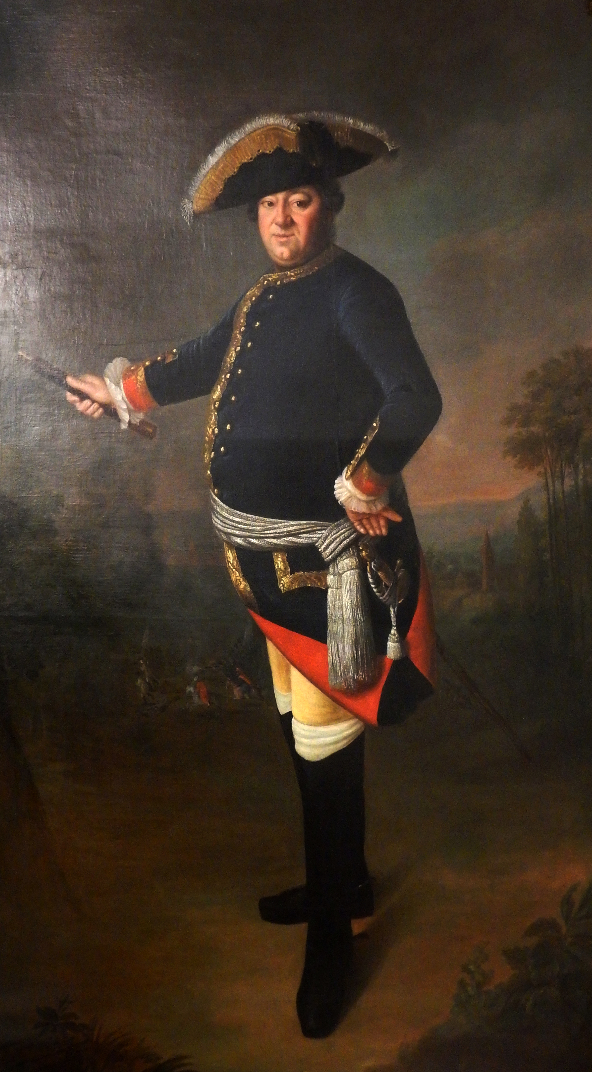 Ölgemälde von General Georg Reinold von Thadden.